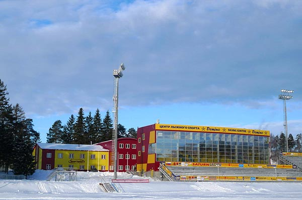 Демино Рыбинский район Ярославская область